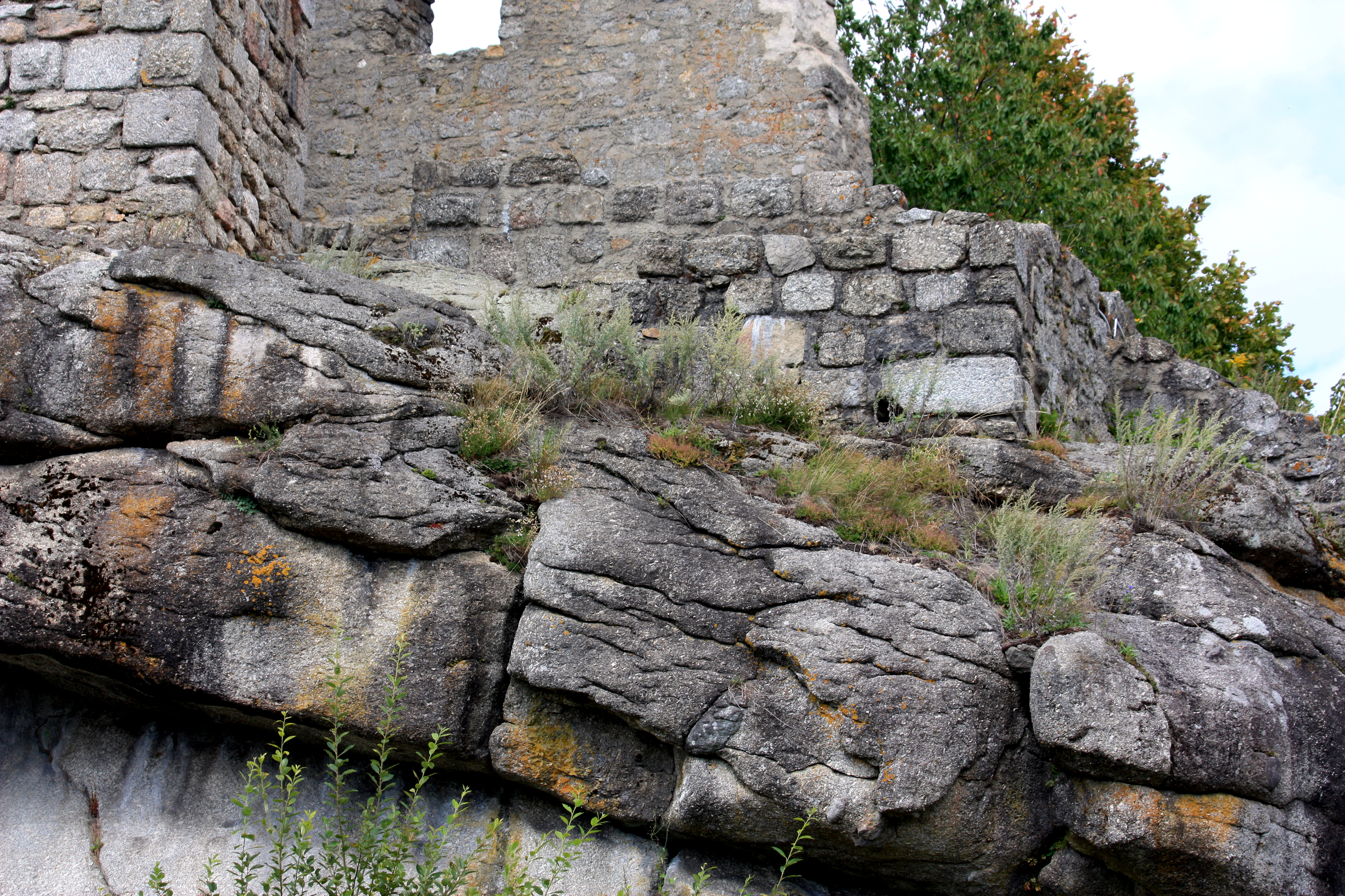 Landkreis Regensburg Brennberg Burgberg Kennung 375R027 Gesteinsschichten